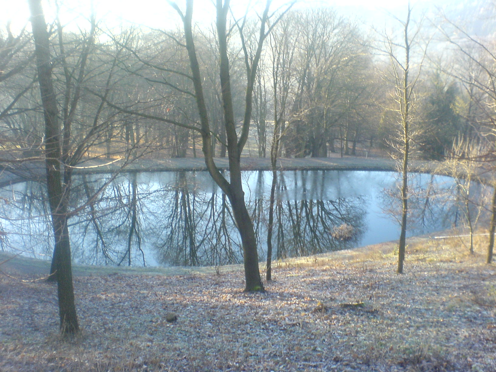 Zámecký park Letovice - fotografie jezírka